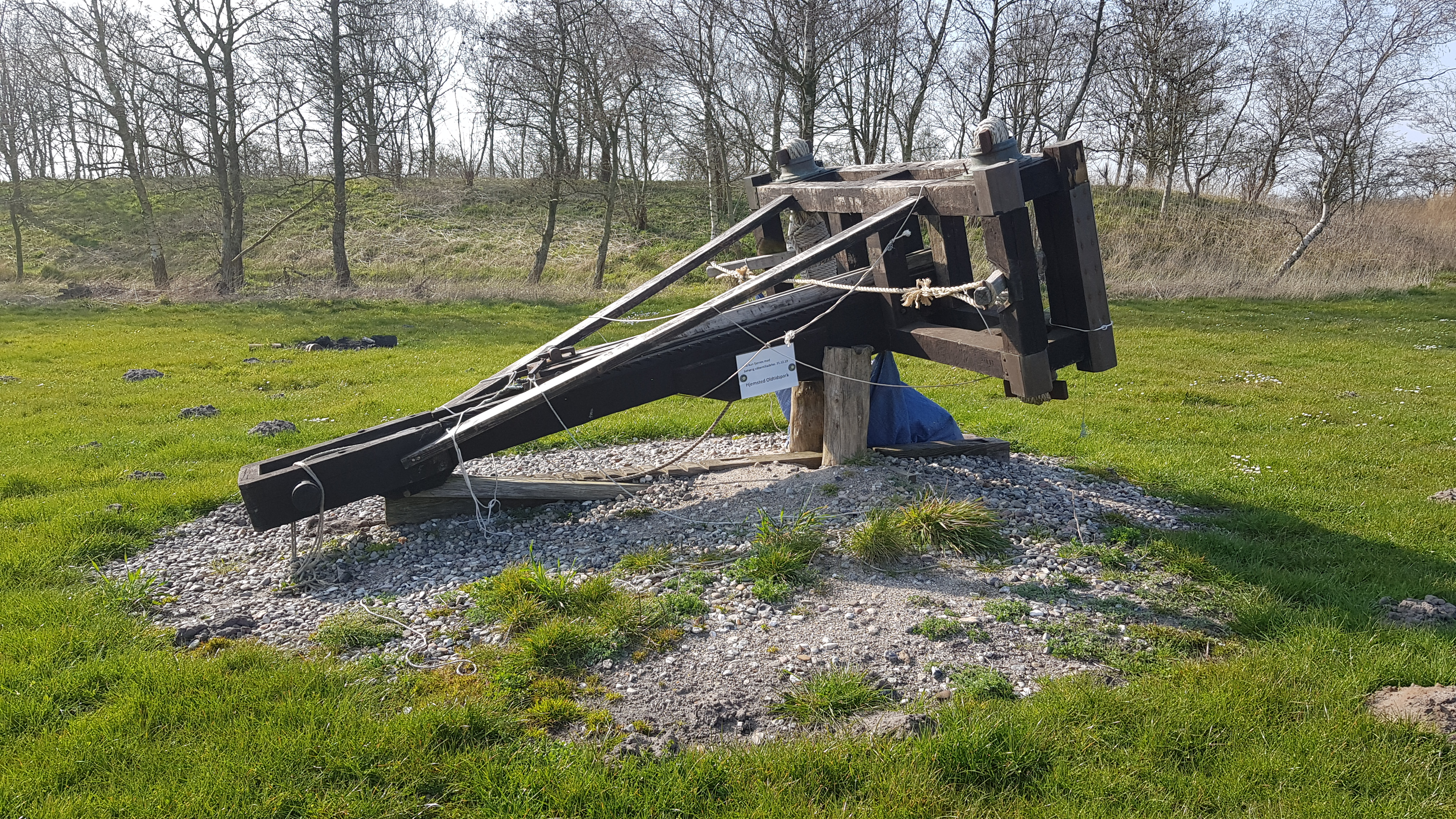 Hjemsted Oldtidsparks 1½ tons tunge rekonstruktion af en ballista, fundet ved oldtidsbyen Hatra, der lå i det sydlige Irak. Den kan skyde et spyd 400 m og gennemtrænge op til 6 pansrede soldater. Sedlen på den kundgør at flytning af den kræver våbentilladelse.